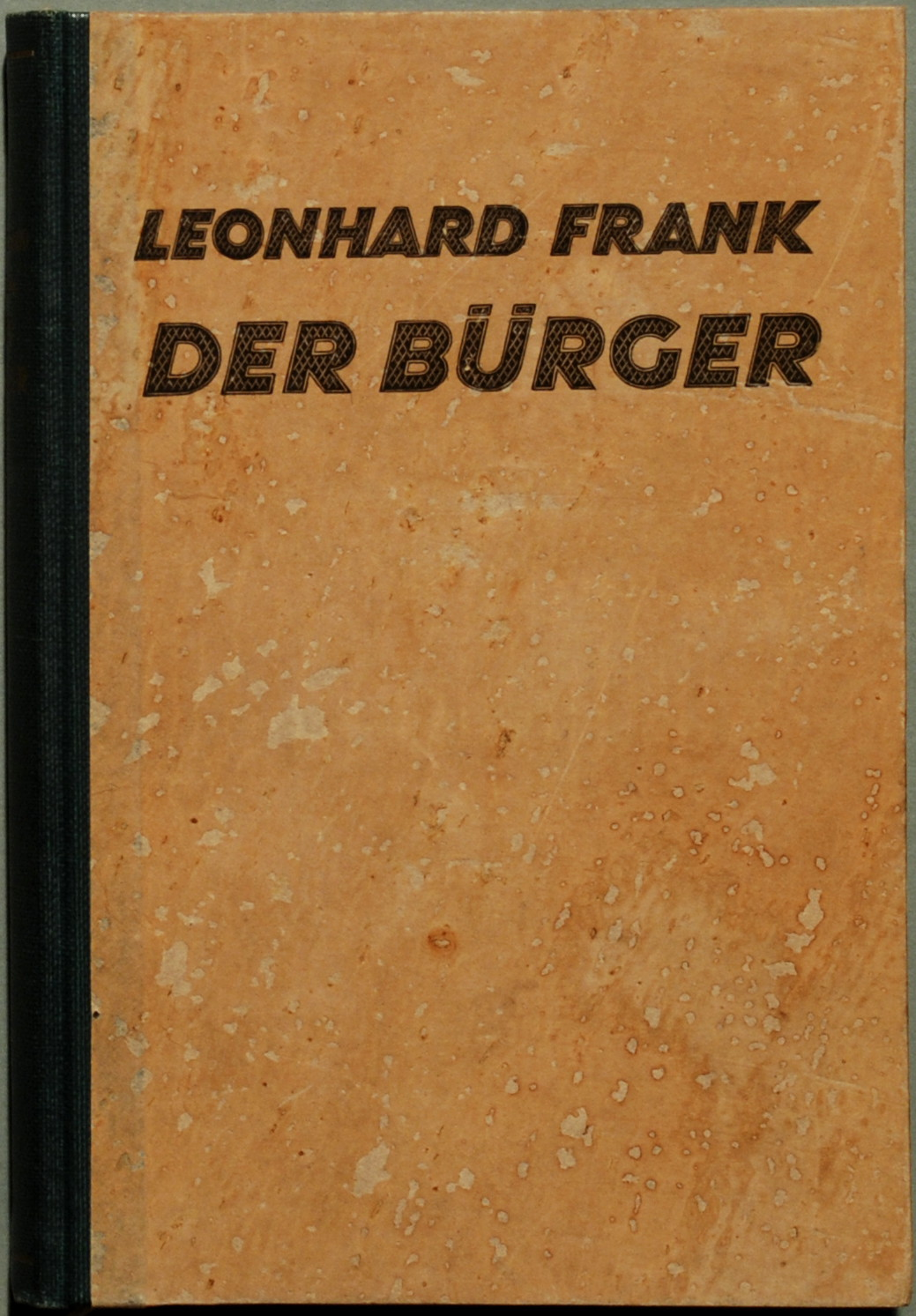 Frank, Leonhard: Der Bürger. Roman. Berlin: Malik 1924, 349 Seiten + 1 nicht paginierte Seite + 1 Blatt Verlagsanzeigen verso Druckvermerk. Wilpert/Gühring² 6, Raabe 7. Original-Halbleinen 8°; Lesebändchen. - Verlagseinband des Erstdrucks.